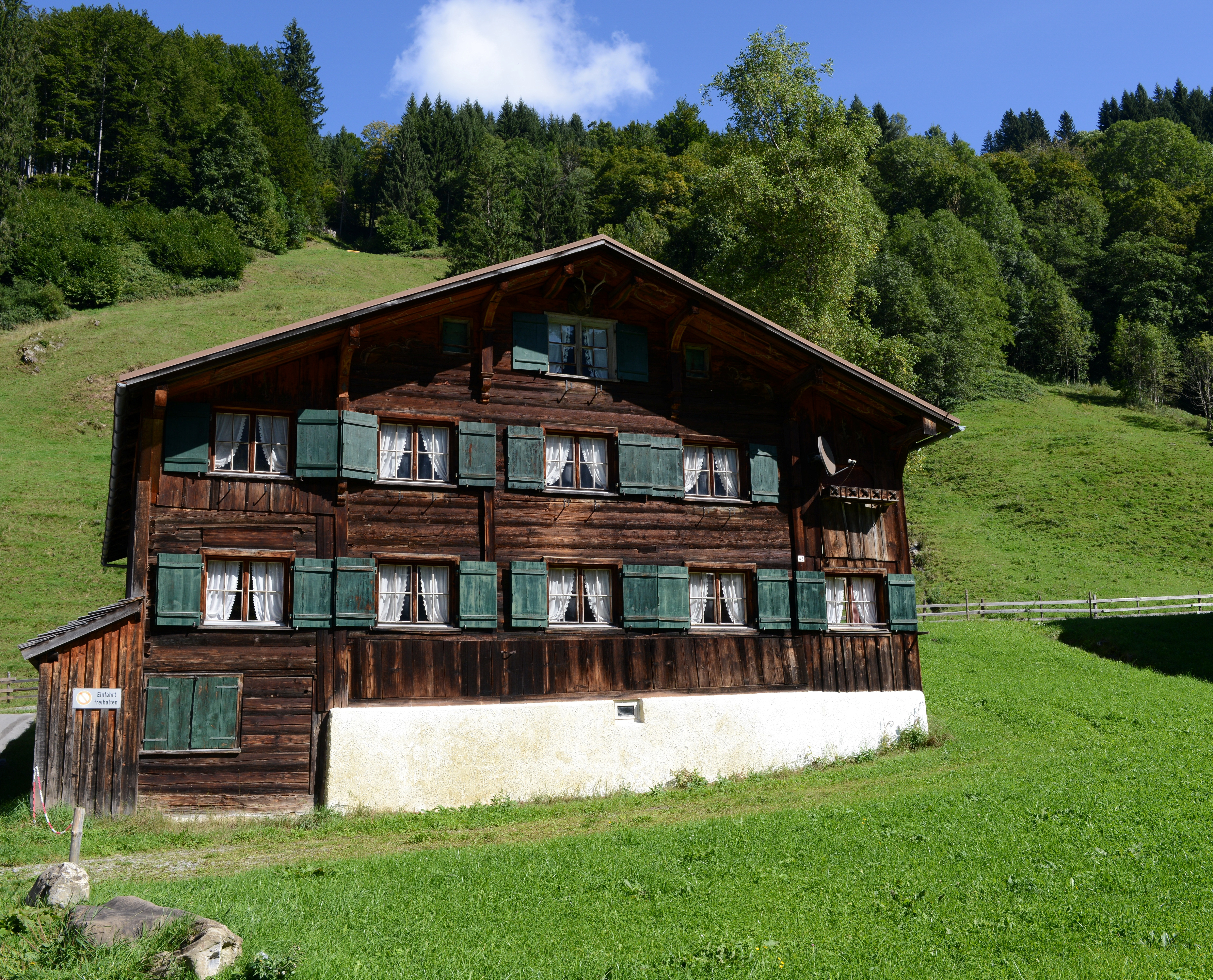 aus dem DEHIO Vorarlberg 1983: Schoppernau, BAUERNHÖFE: Großteils spätes 18. und 1.Hälfte 19. Jhs. beziehungsweise im 19. Jh. ausgbaut, die Wohnteile verschindelte Blockbauten mit 4- bis 6achsigen Giebelfronten und traufseitig offenem Schopf. Ensembles bilden im Ortskern Nr. 12-19 (Nr.14 mit breiter 7achsiger Giebelfront, Ende des 19 Jhs. ausgebaut) und Nr.25,26,28; am östlichen Dorfrand Nr. 62-65 und Nr.67. Nr.43: Einhof, Wohnteil bezeichnet 1786, Blockbau auf Kellersockel, zum Teil mit Bretterschirm, traufseitig offener Schopf, Pfettenunterzüge, Ochsenblutanstrich und Rokokomalerei.